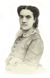 Adelaide Borghi-Mamo (1829-1901), cantora lírica italiana.